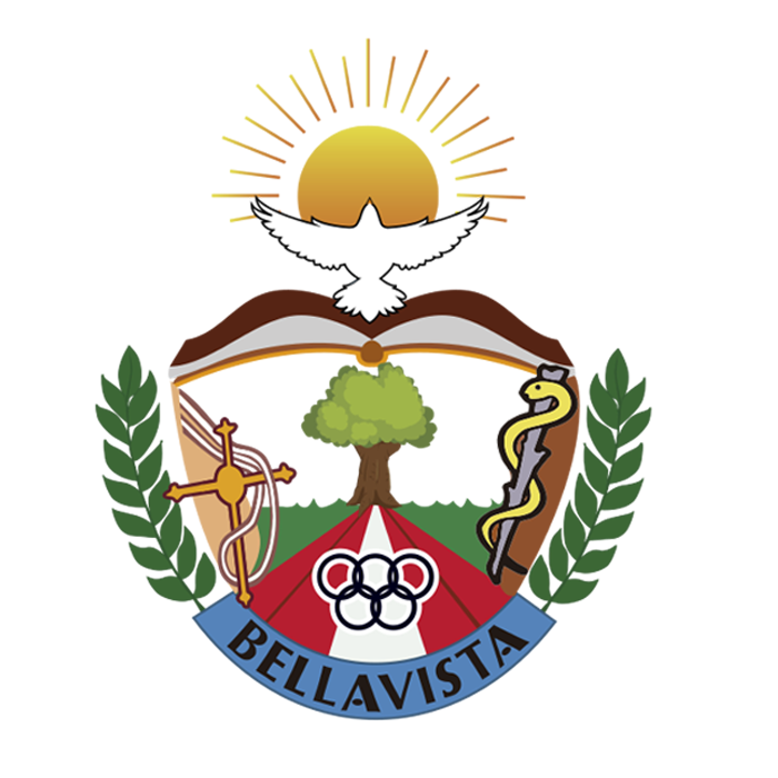 Actual escudo del distrito de Bellavista en la provincia del Callao.